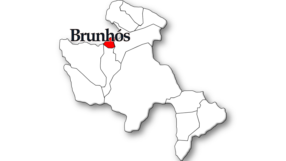 População